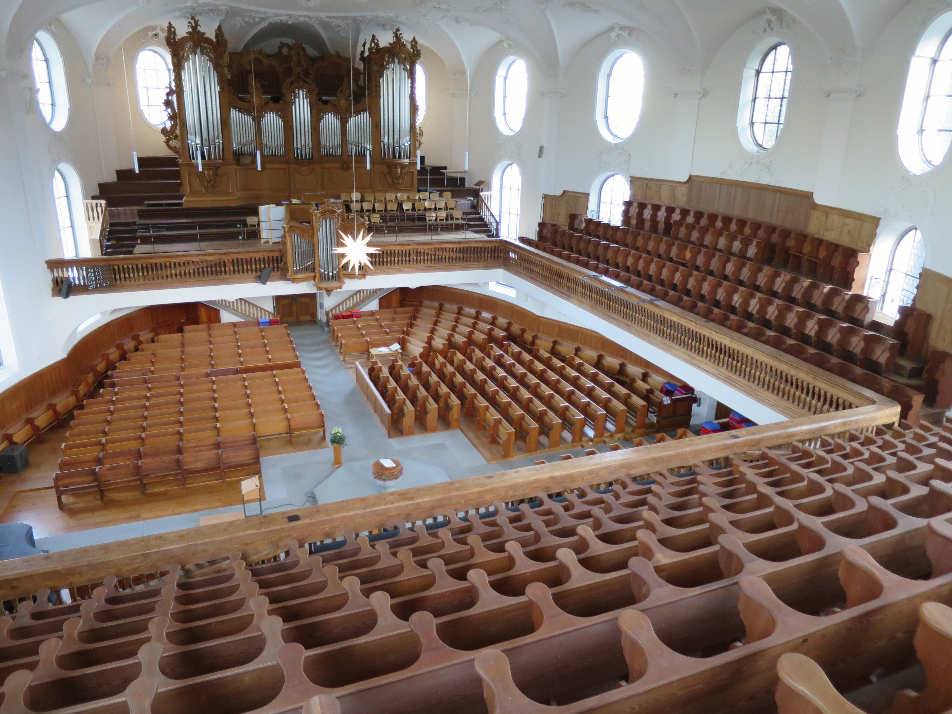 Innenraum der Rokoko-Kirche von Horgen